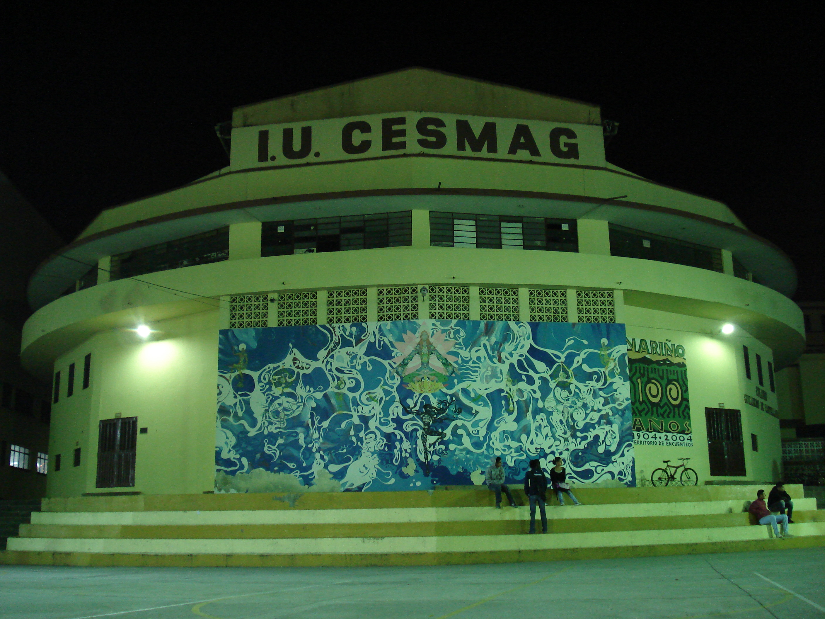 El "Coliseo" de la Institución Universitaria "Centro de Estudios Superiores Maria Goretti" (CESMAG) en San Juan de Pasto, Colombia, de noche.